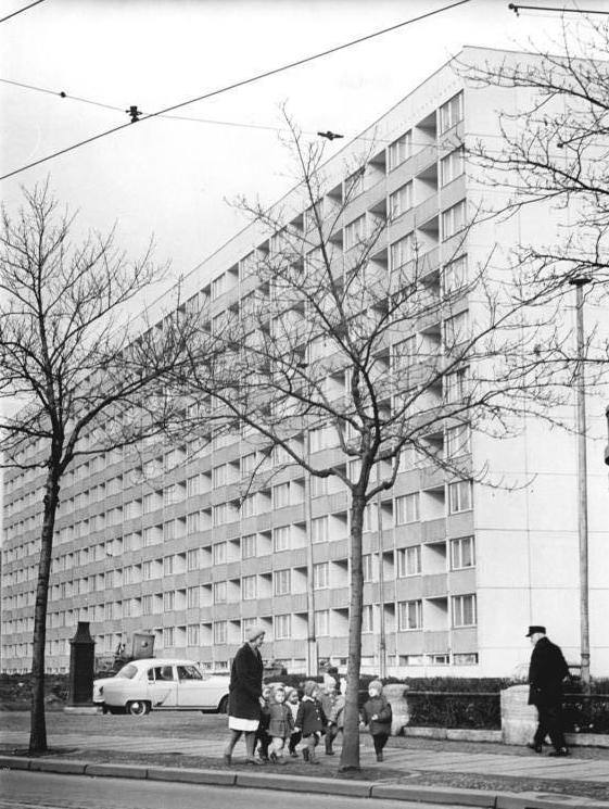 Leipzig, Johannisplatz, Neubauten, Wohnblock Zentralbild Koch 26.2.1966 Mit jedem Neubau verjüngt sich die alte Messe- und Handelsmetropole Leipzig. Unser Foto zeigt Neubauten am Leipziger Johannisplatz.